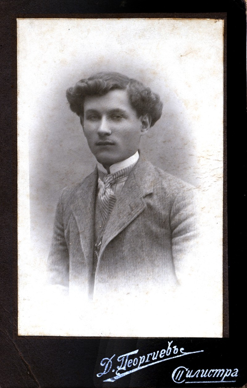 Стефан Боздуганов